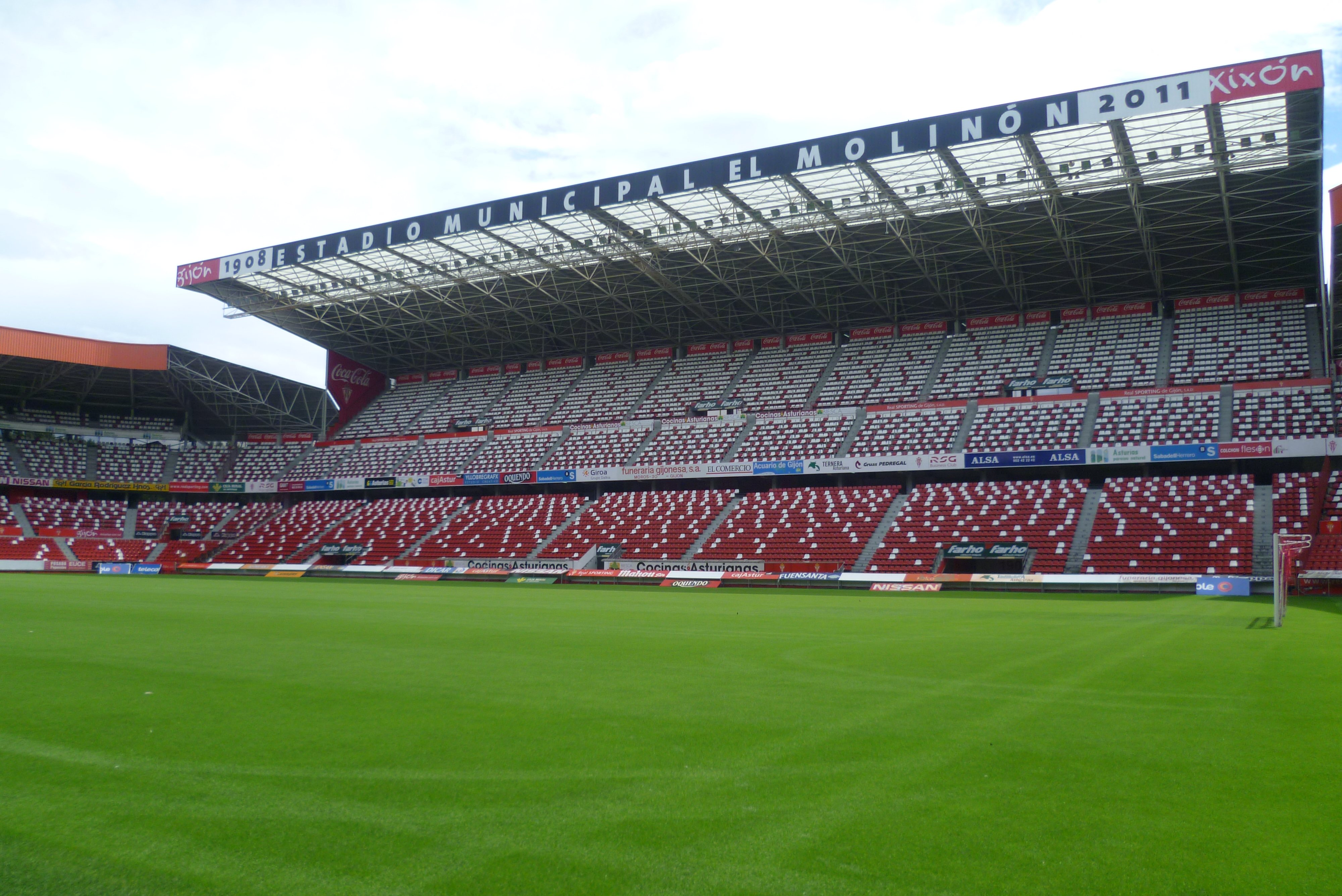 Grada este del estadio El Molinón de la ciudad de Gijón